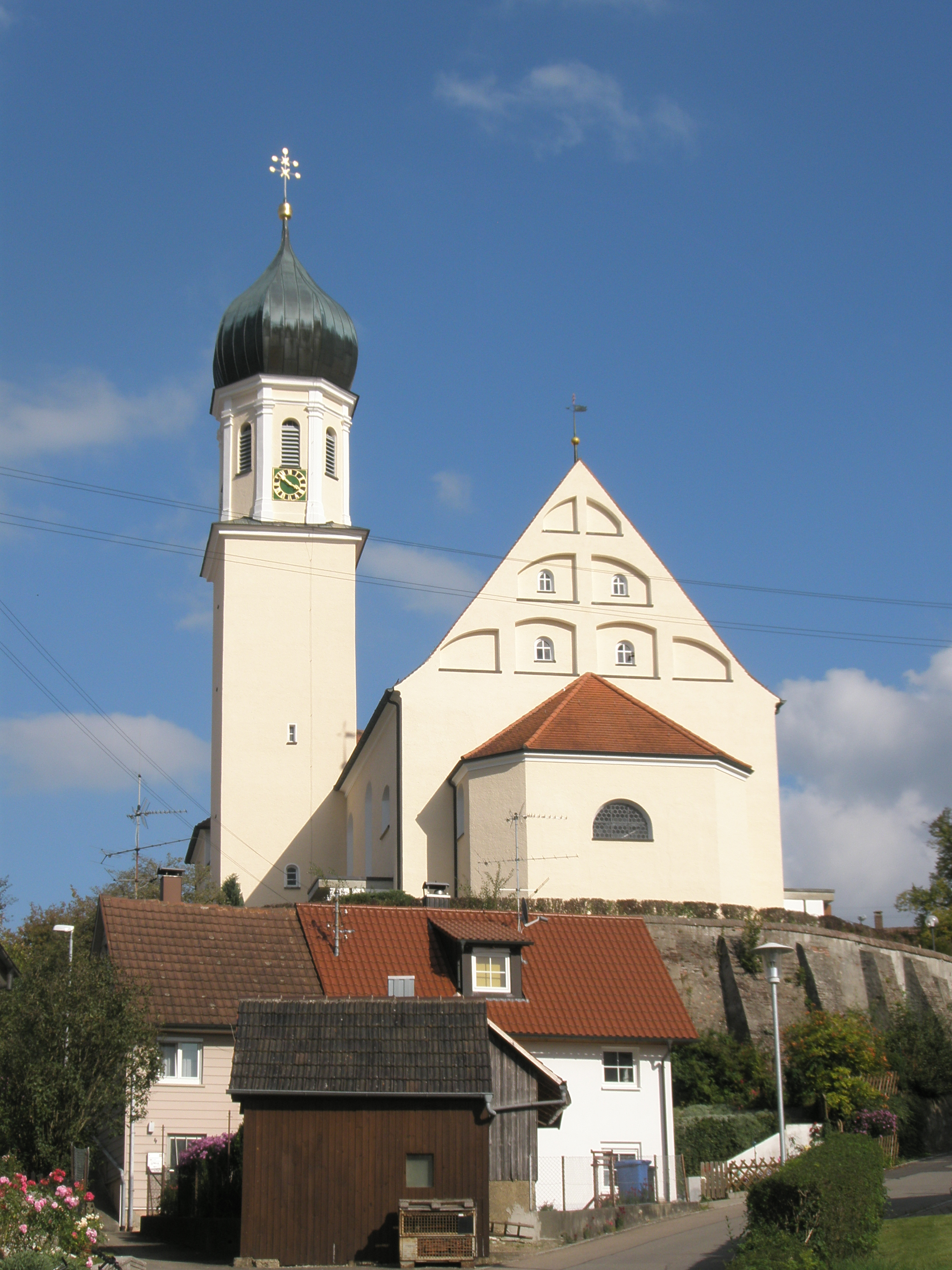 Die Schwendier Pfarrkirche St. Stephanus, von der Steigstraße aus gesehen.